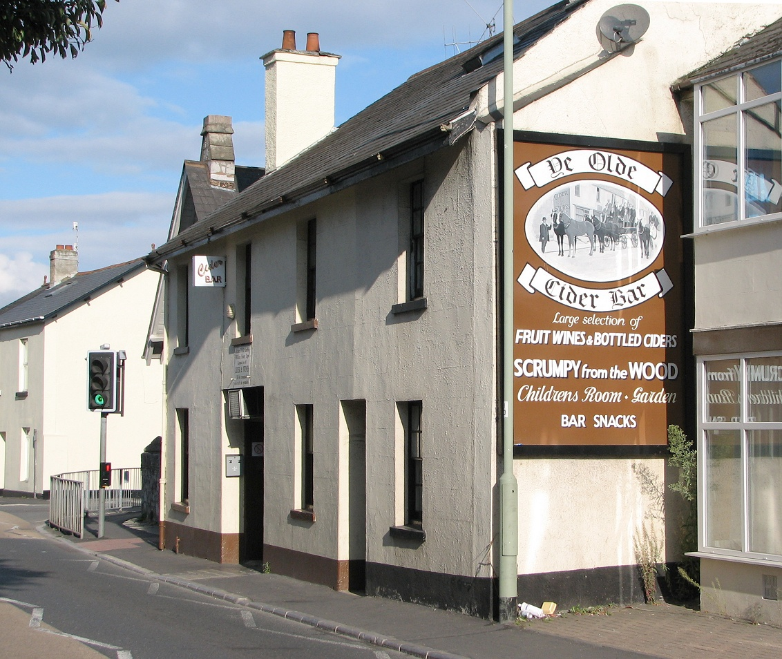 Ye Olde Cider Bar, Newton Abbot, Devon, England